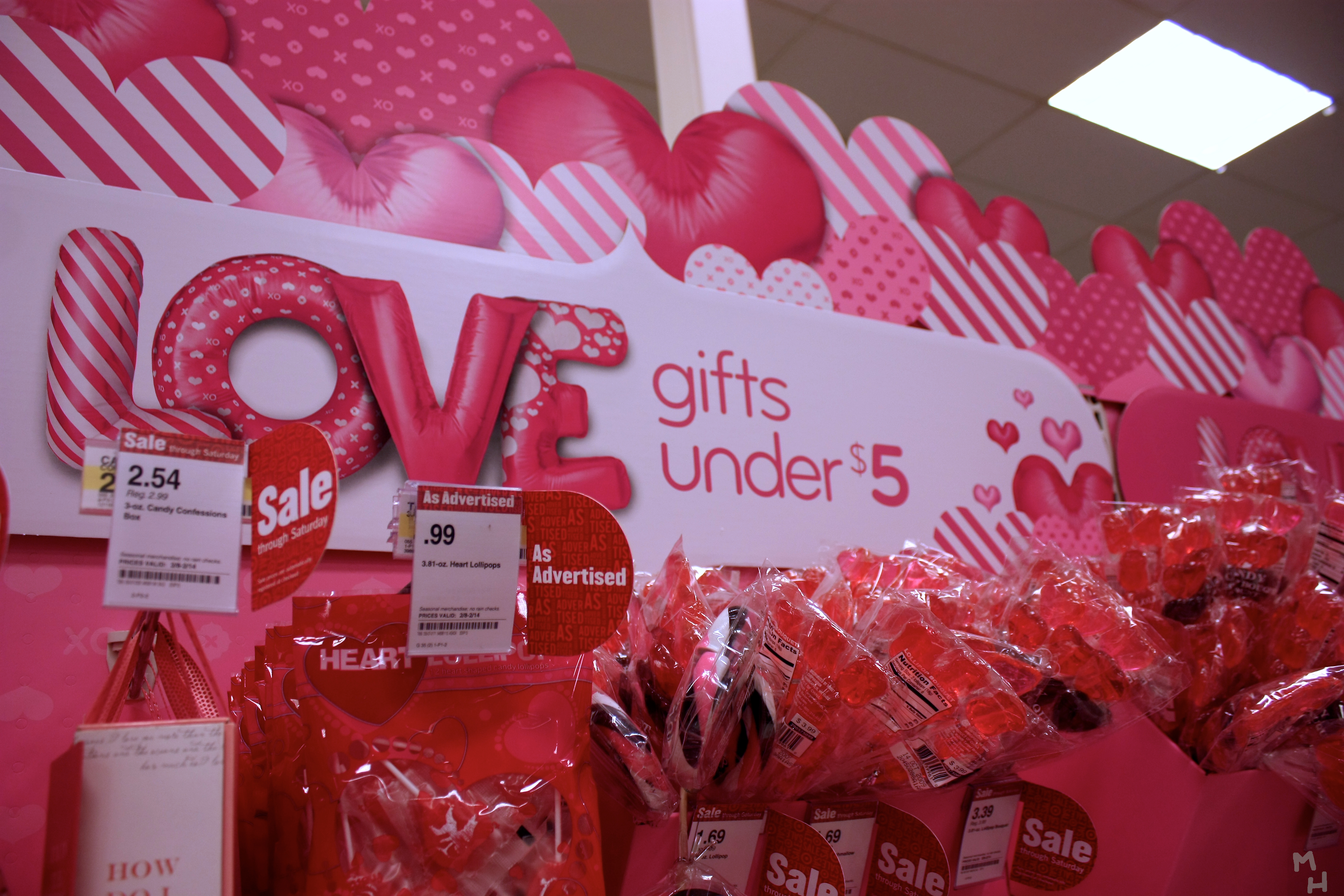 Love 5